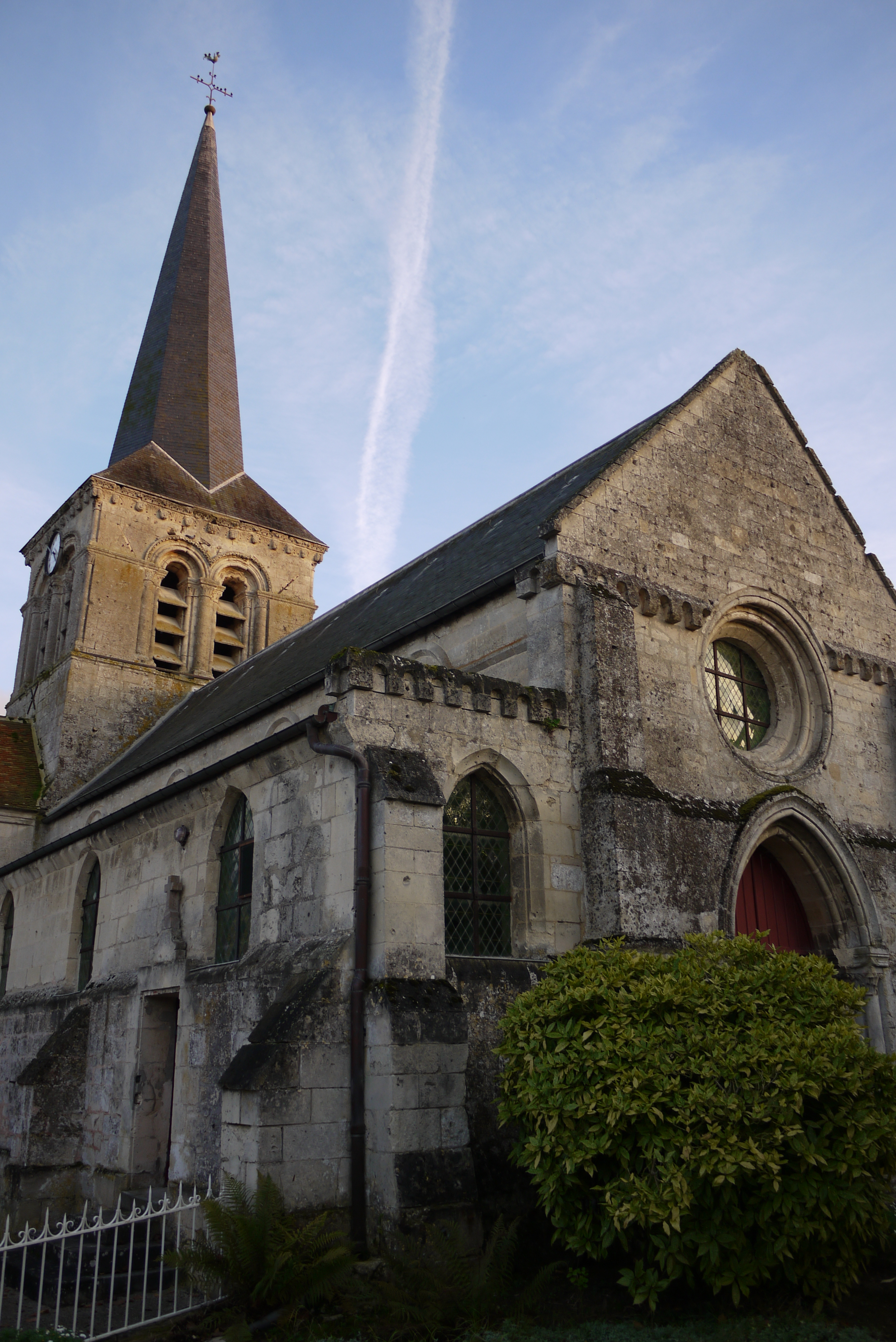 Église Saint-Jean-Baptiste de Chacrise